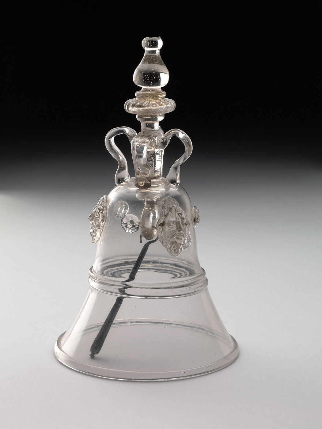 Willet hield van bijzondere voorwerpen, zoals dit glas in de vorm van een tafelbel. De wonderlijke naam, een verwijzing naar de Spaanse graaf Alva, heeft betrekking op de plechtige afzwering van Philips II als vorst der Nederlanden in 1581. Bij het feestbanket dat ter ere van deze gebeurtenis werd gegeven klonk men met ‘glaze klokjes’ op de voorspoed van de nieuwe Republiek. Tegelijkertijd werd de gehate Alva hiermee op subtiele wijze uitgeluid.